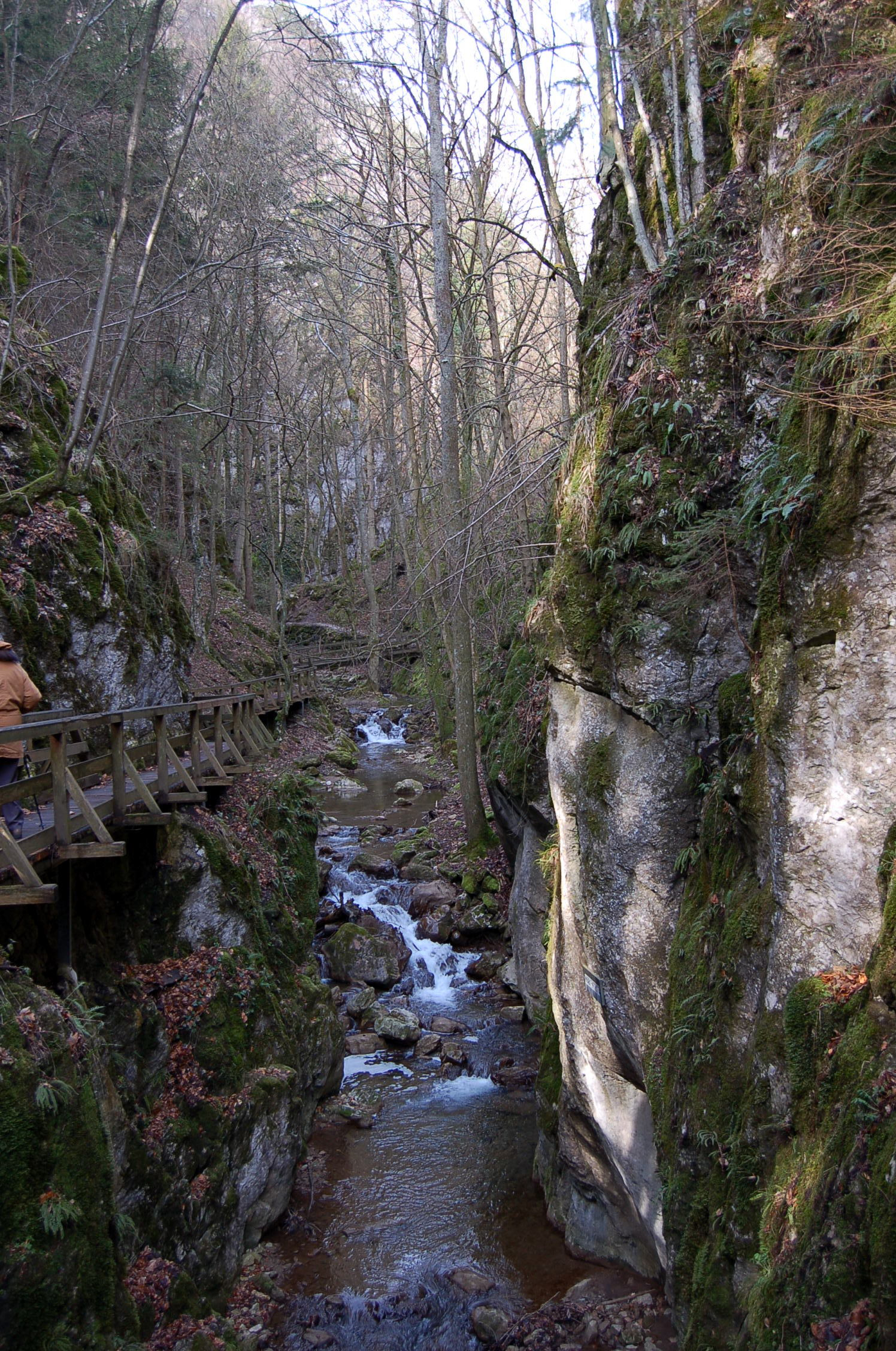 Johannesbachklamm, Würflach, Niederösterreich/Lower Austria